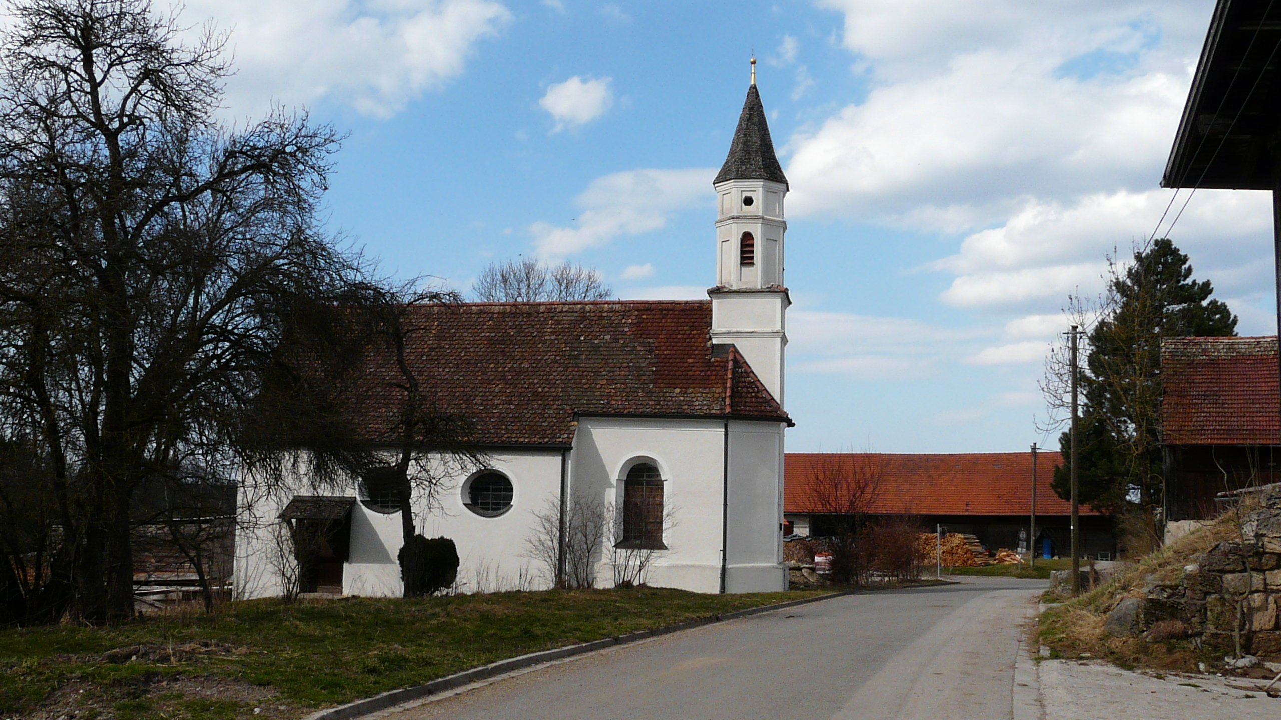 St. Hilaria in Arnried, Eberfing